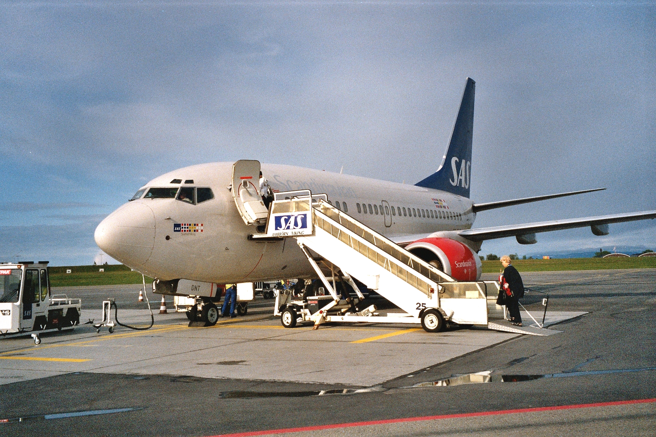 Bildbeskrivning: Påstigning på flygfältet i Östersund